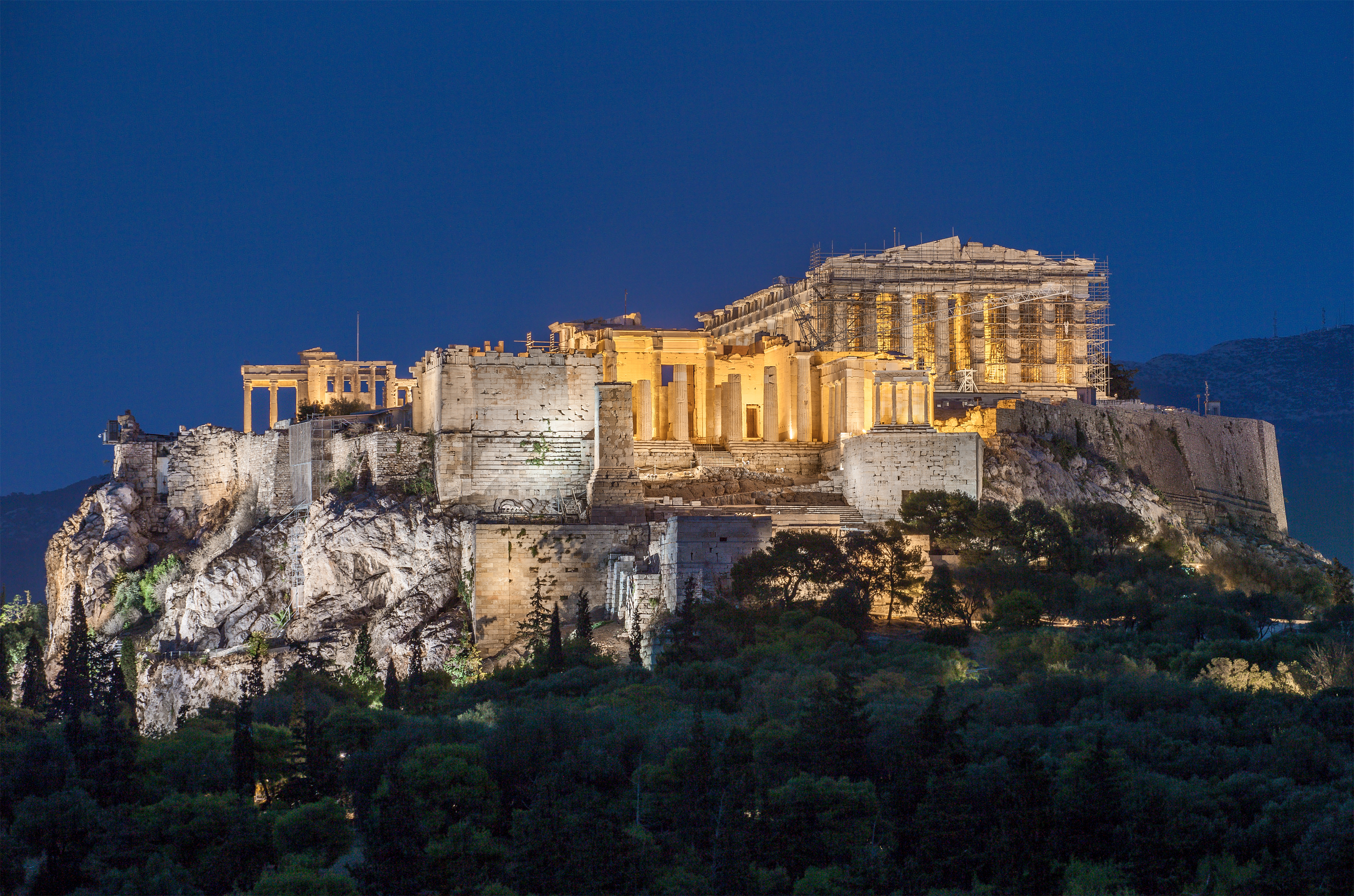 «Ακρόπολη Αθηνών»